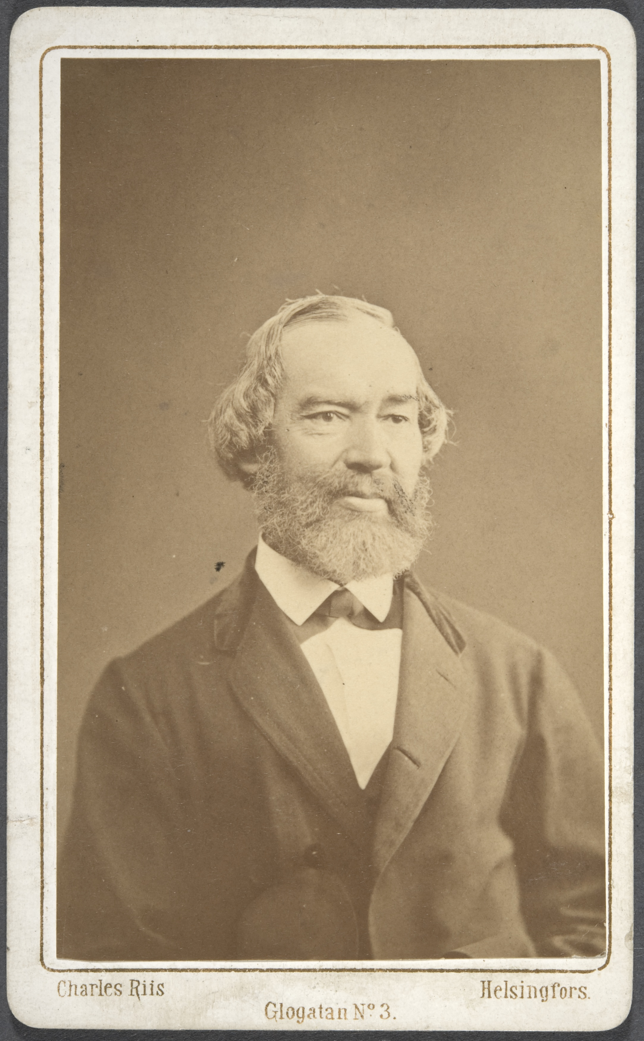 Suomen Rahapajan johtaja August Fredrik Soldan (1817–1885)